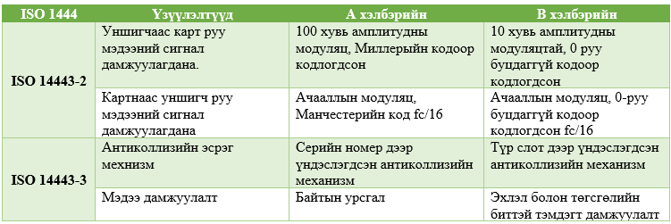 Монгол: ISO 14443 стандарт